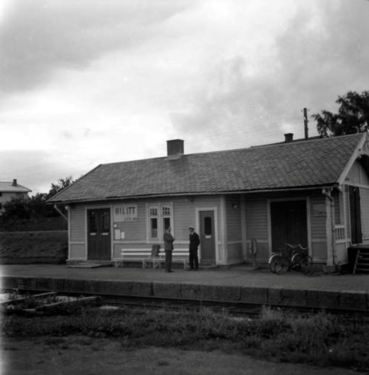 Bilitt stasjon. Ukjent fotograf (1962–63). Fra Jernbanemuseets samling via Lokalhistoriewiki.